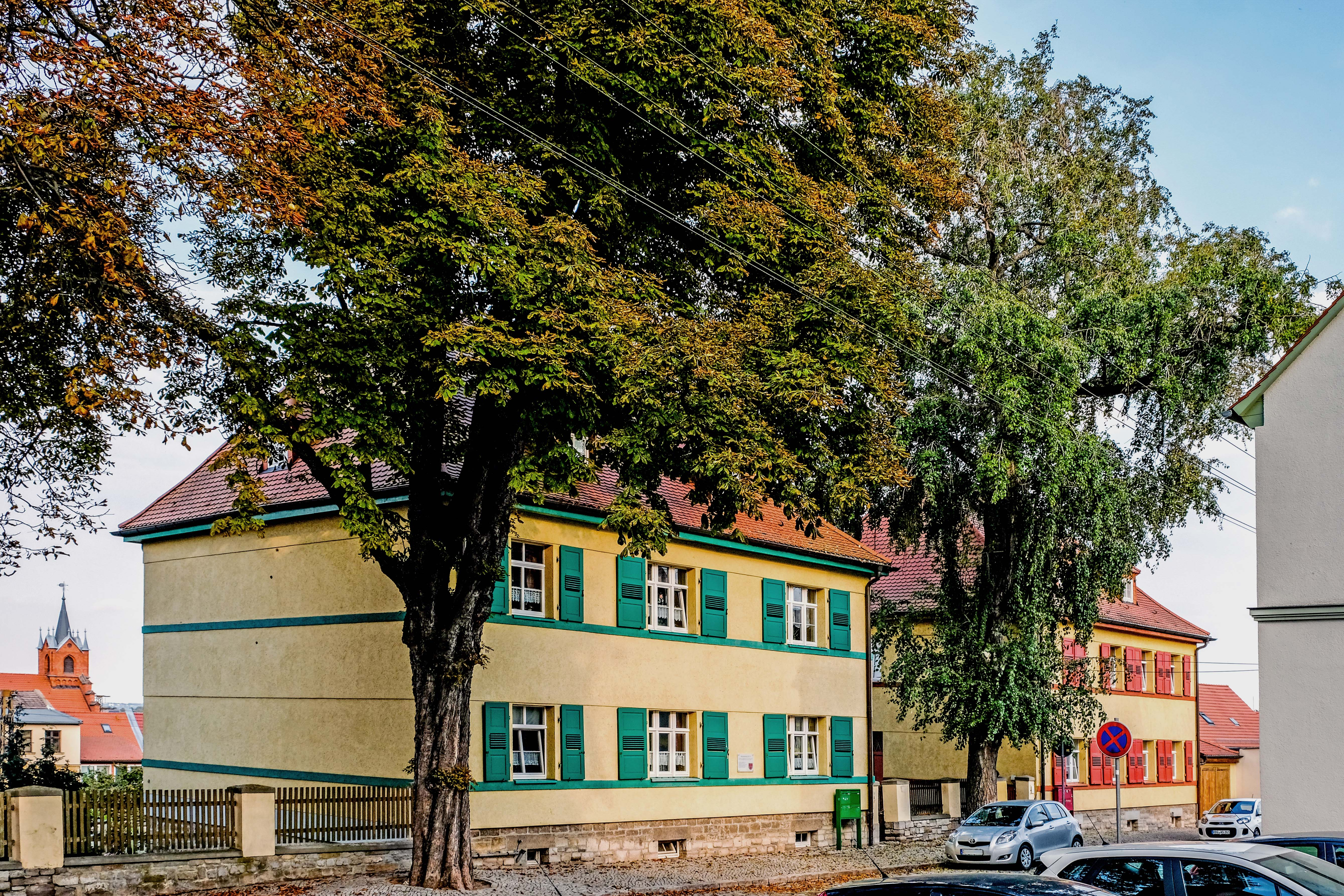 Ehemaliges Landambulatorium von Alsleben. Es wurden nach Schließung Wohnungen errichtet. Links ist der Rathausturm zu sehen.